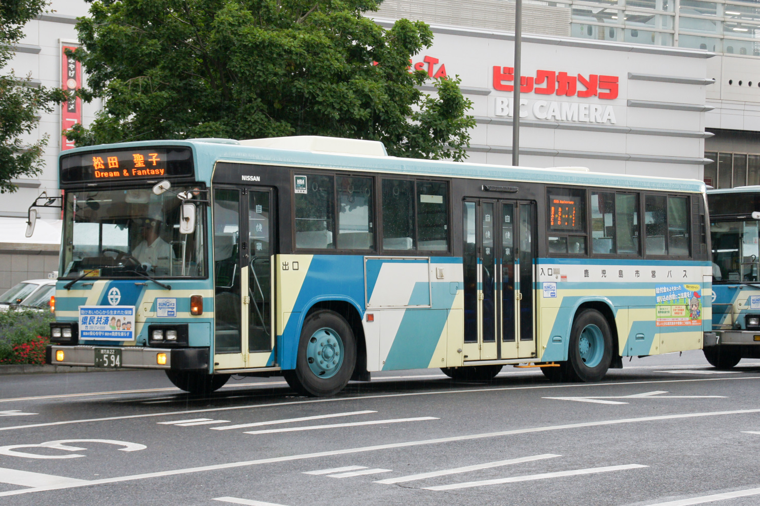 松田聖子臨時バス